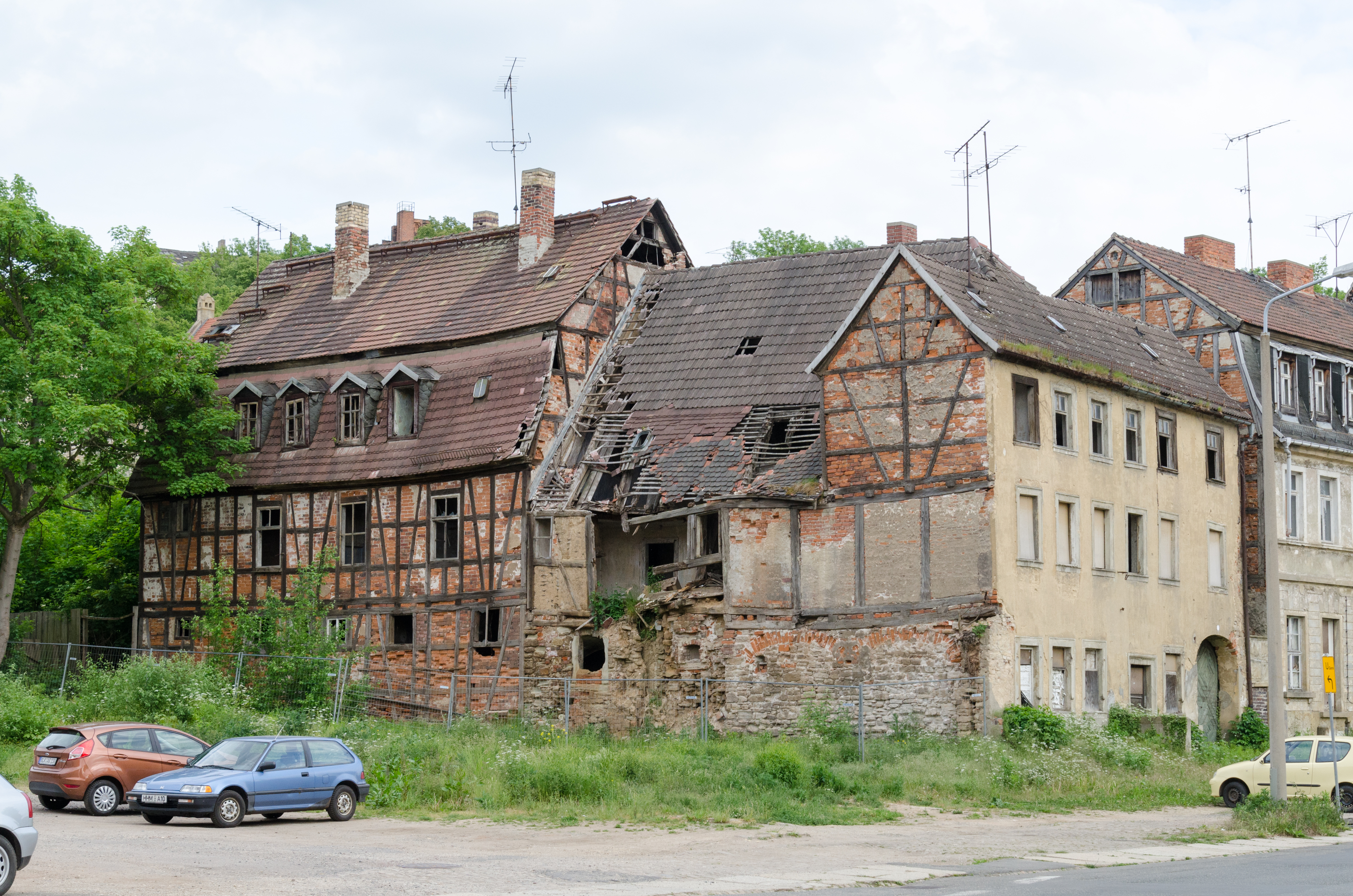 Zeitz, Brühl 5, Nordseite